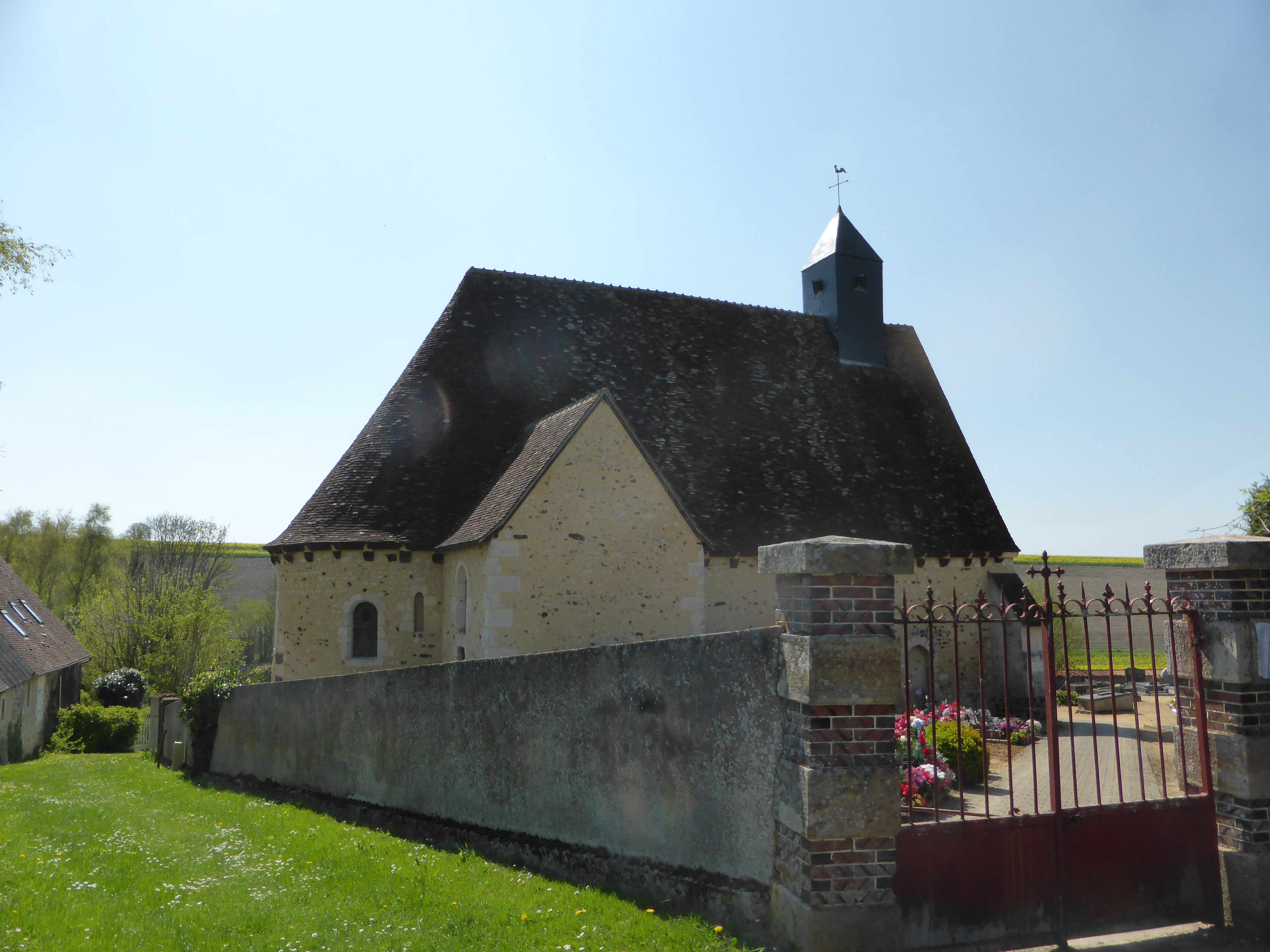 Église Notre-Dame de La Gaudaine, en Eure-et-Loir.